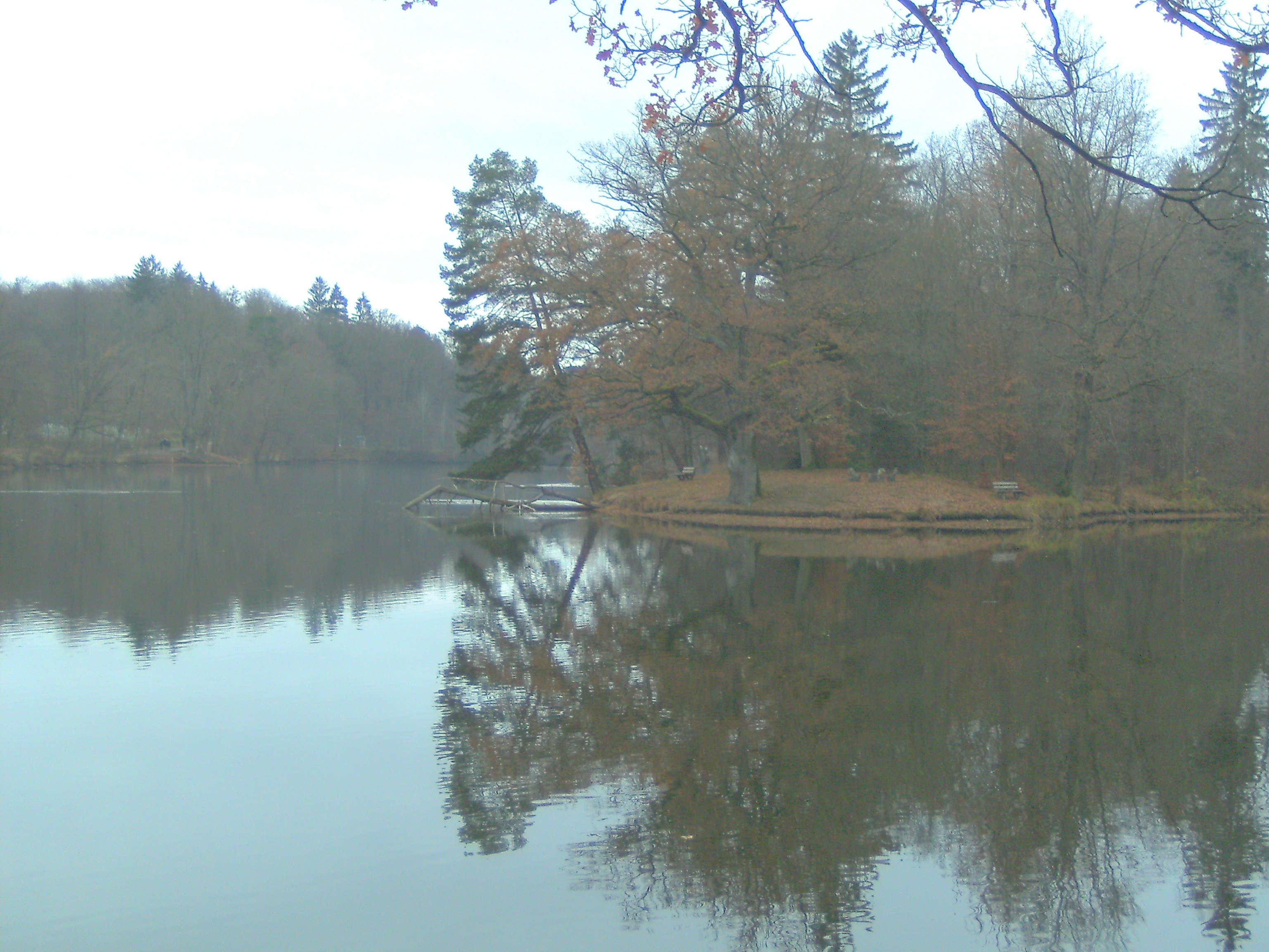 Pfaffensee im Pfaffenwald Stuttgart. Wasserversorgung und Parkgebiet beim Bärenschlössle.